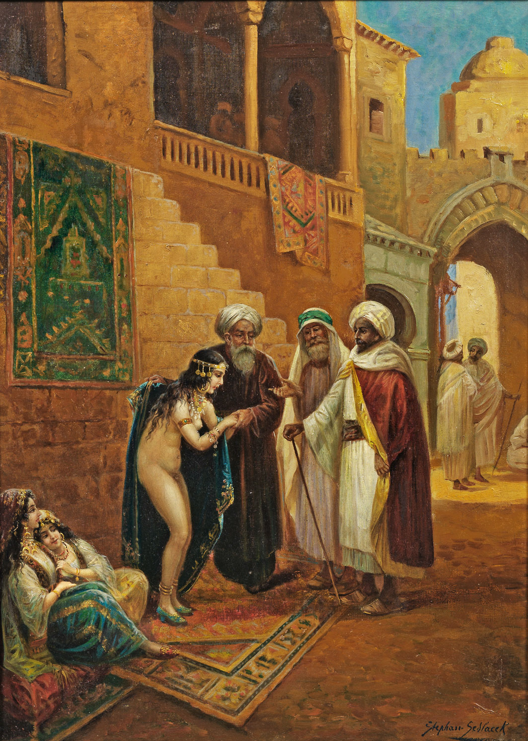 Die neue Haremsdametitle QS:P1476,de:"Die neue Haremsdame" label QS:Lde,"Die neue Haremsdame"